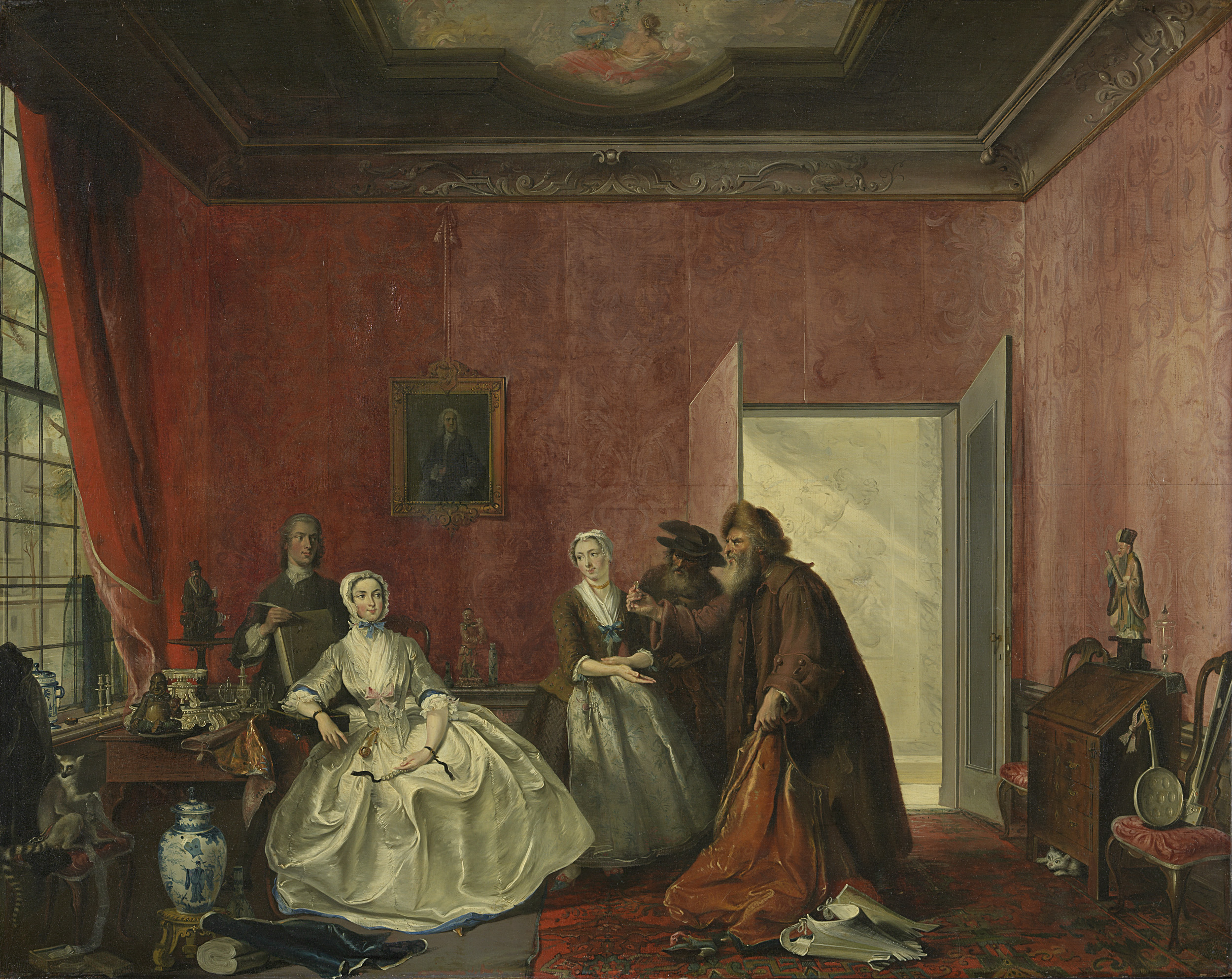 De 'Spilpenning', scène uit het derde bedrijf, vijfde toneel, uit het gelijknamige toneelstuk van Thomas Asselijn: Johanna's spilzicht wordt ontdekt door haar man Gerardus en haar vader Augustijn, die zich als Poolse kooplieden (smousen) verkleed hebben. Johanna zit in een kamer met een plafondschildering aan een tafel die vol staat met allerlei curiosa, Chinese porcelein, beeldjes en rollen textiel. Op de stoel links zit een ringstaartmaki, rechts is een kat onder de kast weggekropen.